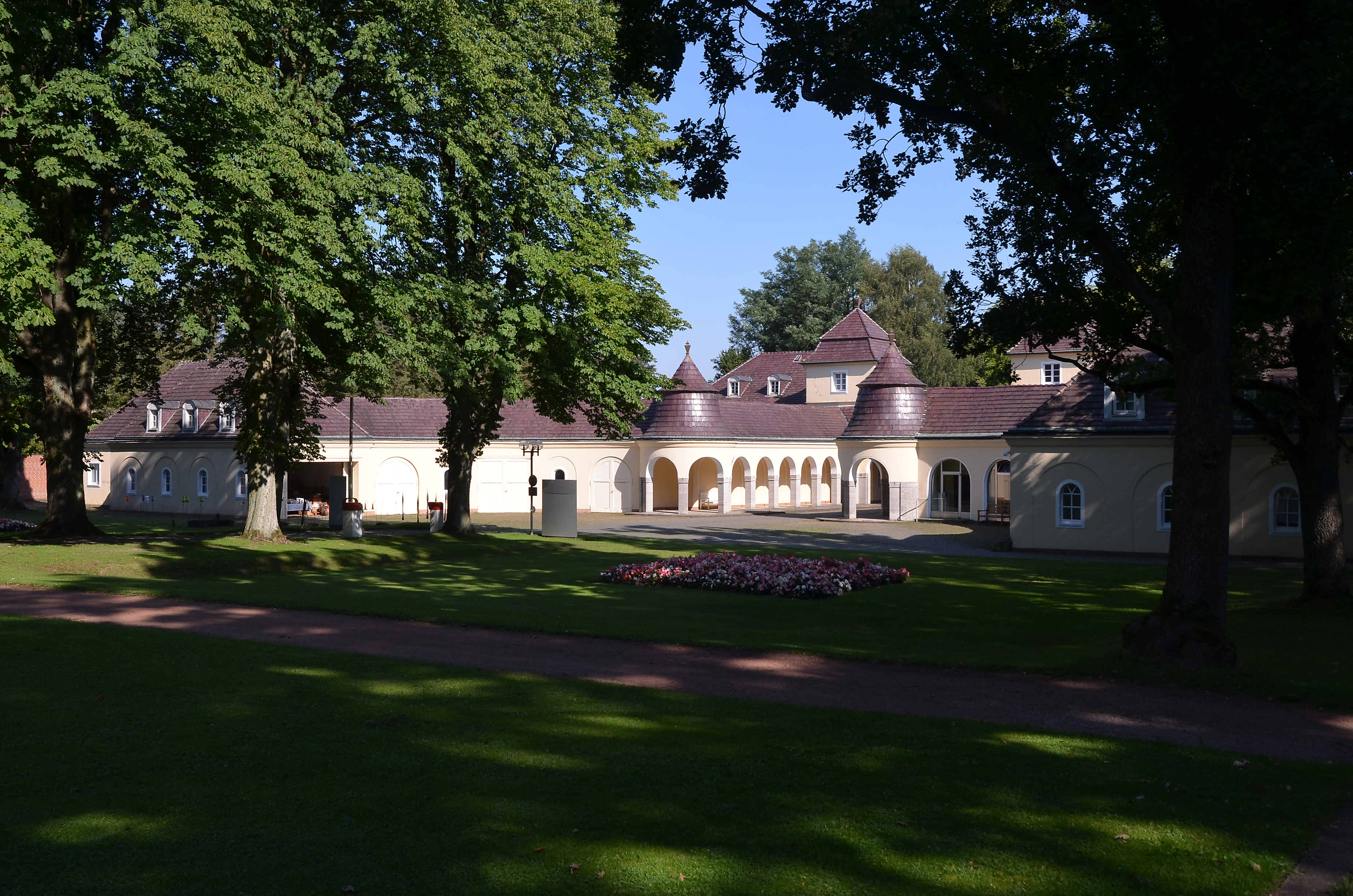 Park Klinik Bad Hermannsborn, Hermannsborn 1, Bad Driburg, Brunnenanlage vom Park aus gesehen This image shows a heritage building in Germany, located in the North Rhine-Westphalian city Bad Driburg (no. 43).